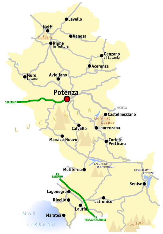 Kaart van de provincie Potenza